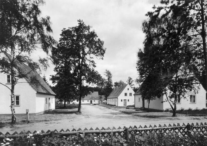 In diesen freundlichen Siedlungshäusern sind die Bewohner von Espelkamp untergebracht.